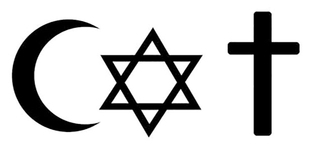 Abrahamdar erlijioak